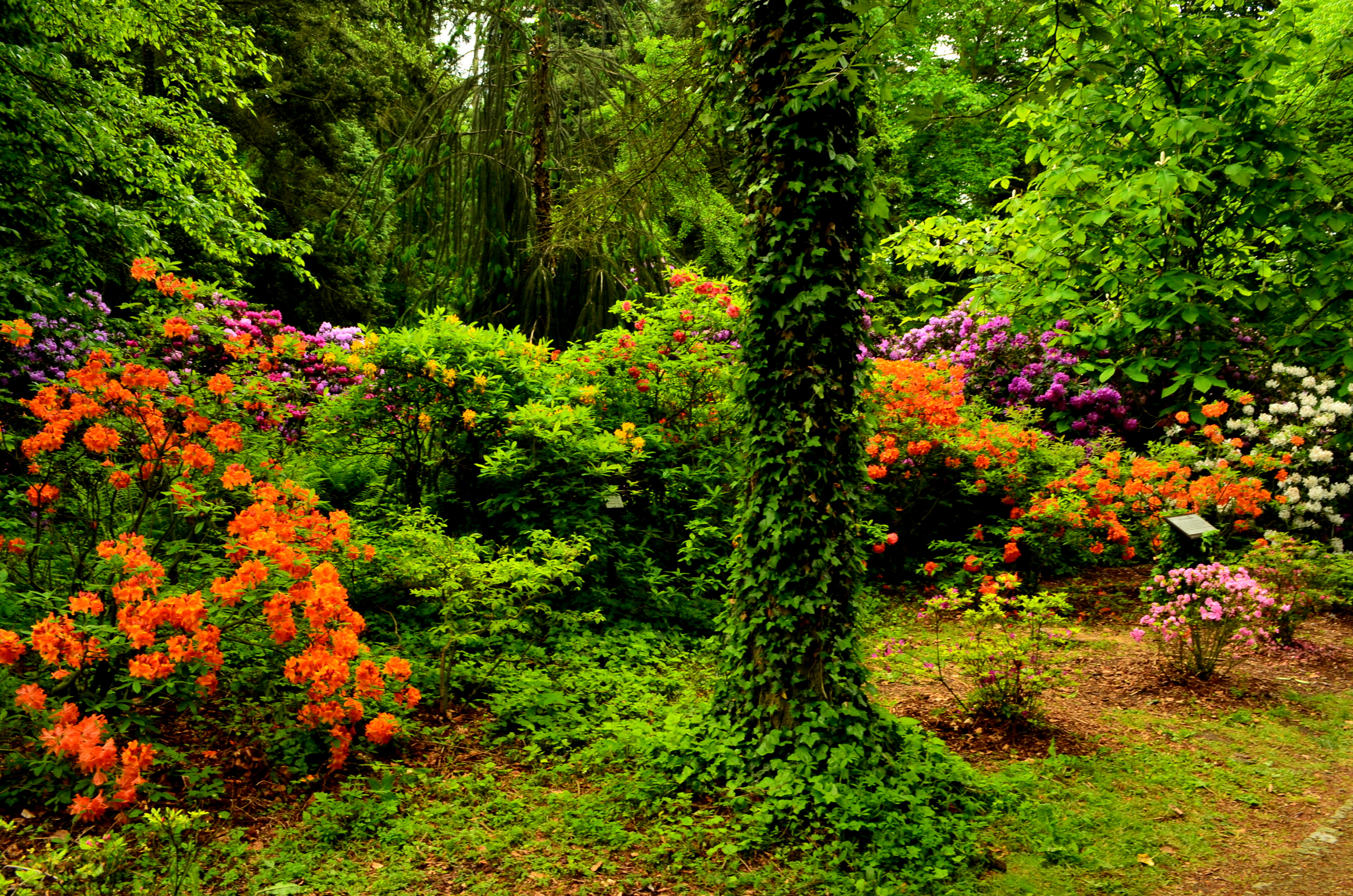 Kórnik, park